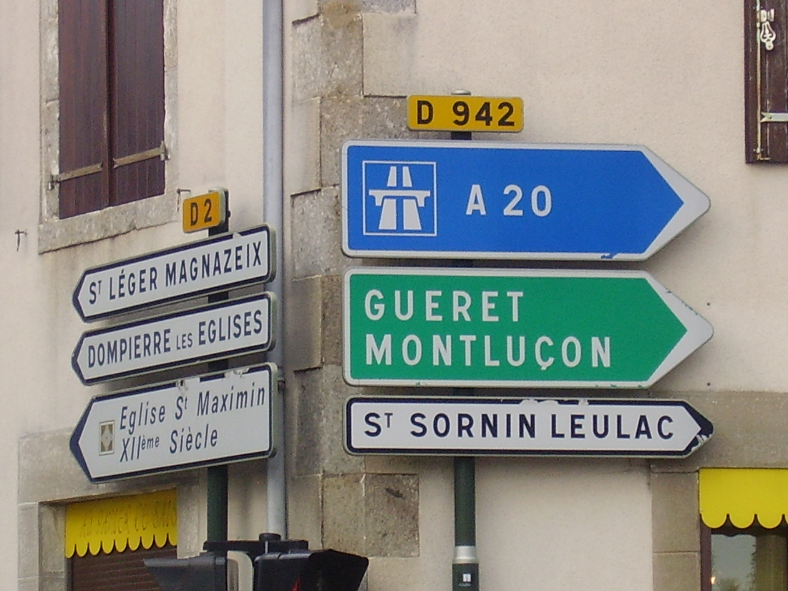 Panneaux de la RD 942 à Magnac-Laval (Haute-Vienne, Limousin, France), vers A20/Guéret (Creuse, Limousin)/Montluçon (Allier, Auvergne)